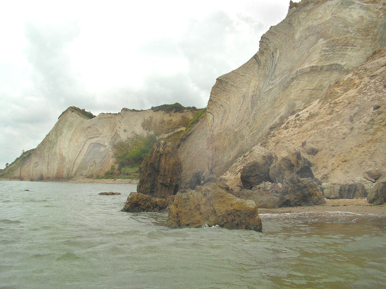 Widoczne klify są bogatym źródłem skamielin.